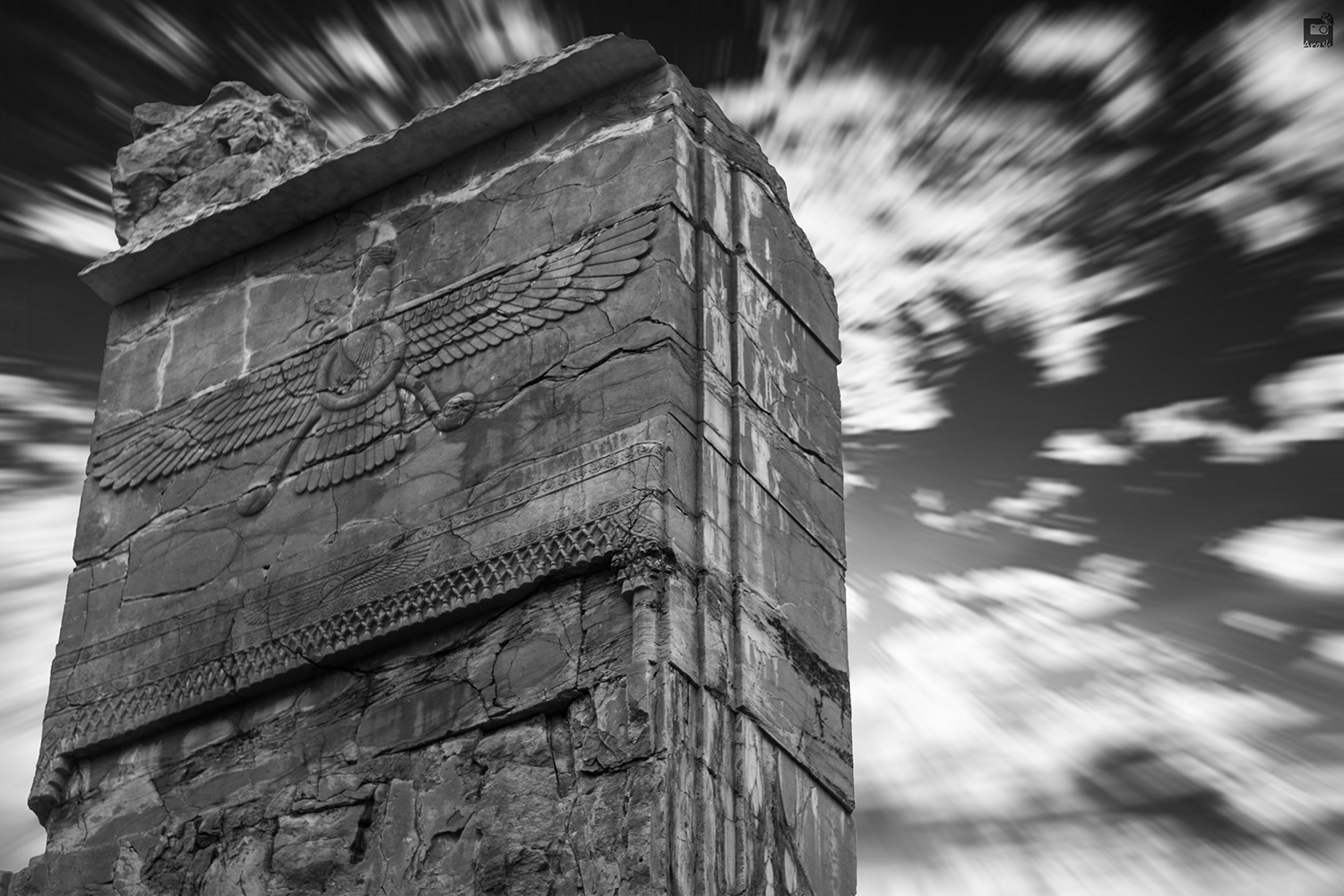 نماد فرکیانی حجاری شده روی دروازه شرقی کاخ سه دروازه پارسه